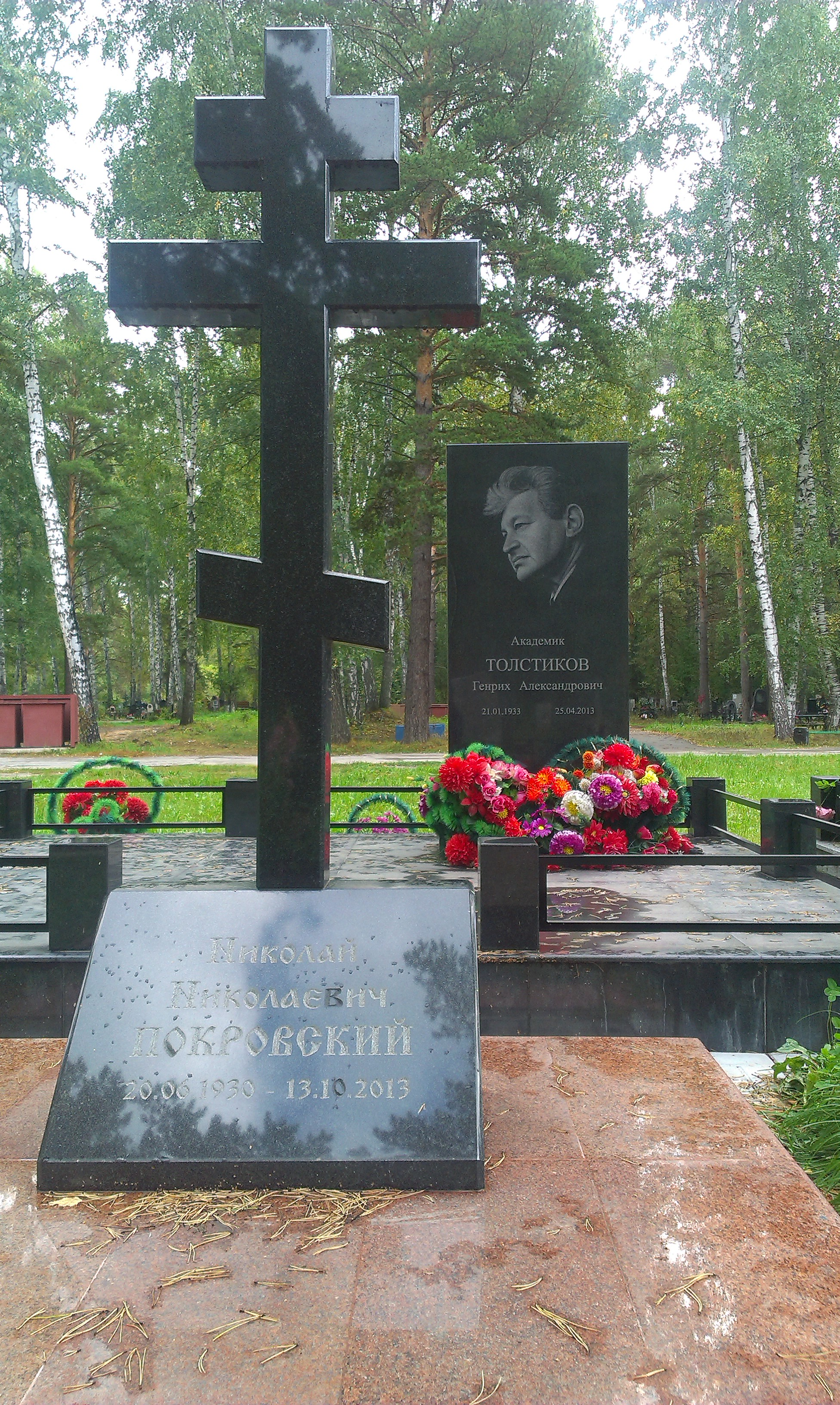 Южное (Чербузинское) кладбище